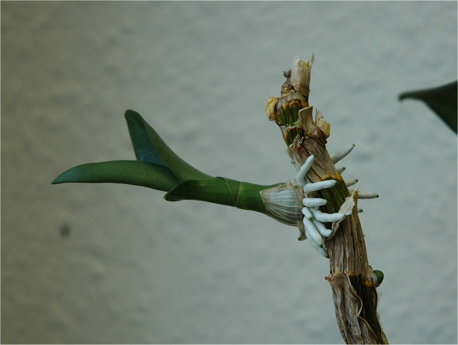 Kindel-Bildung an einer Orchidee (Dendrobium spec)